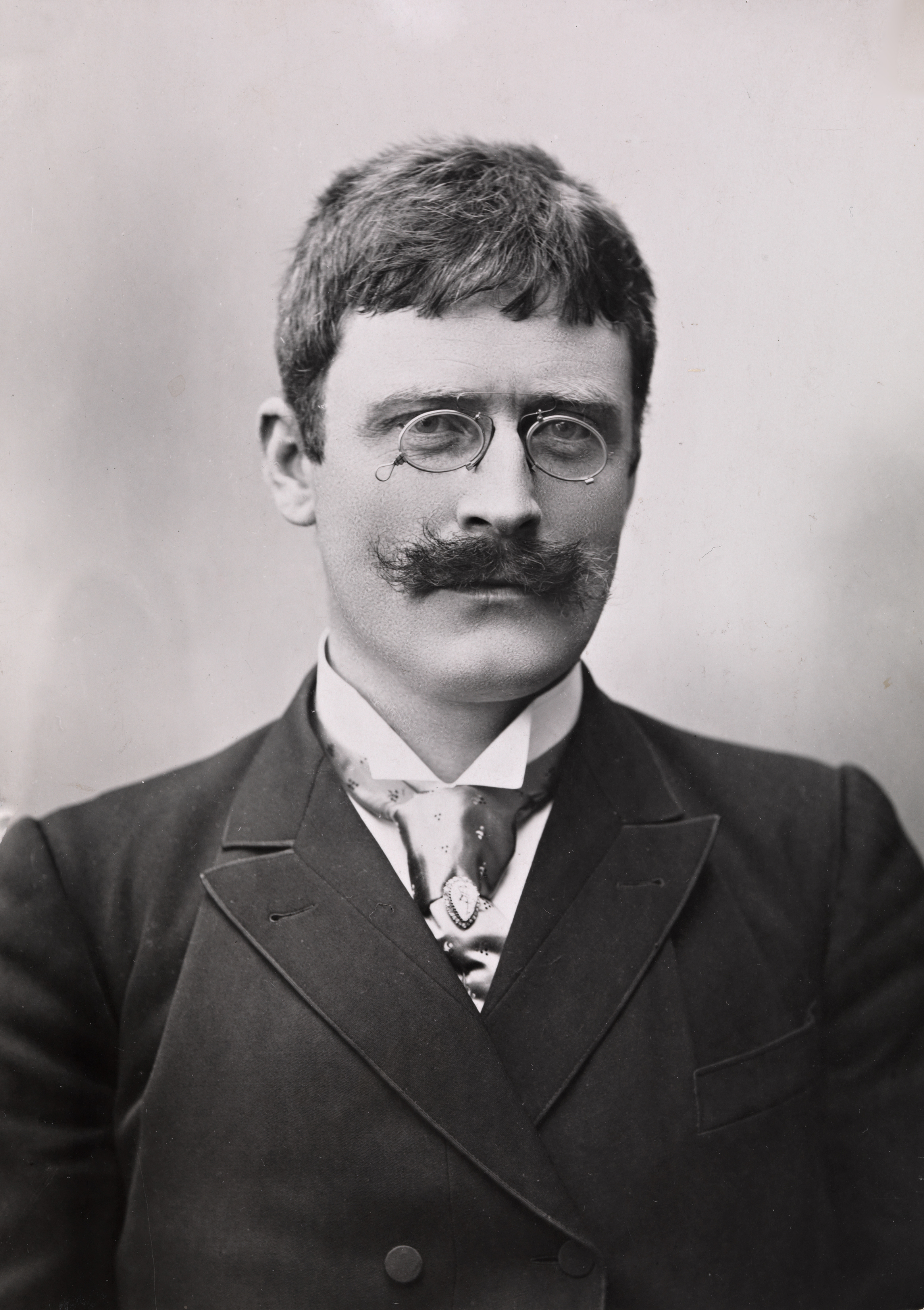 Knut Hamsun i 1895. Bildet er tatt i Lillehammer. Foto: Alvilde Torps eftf. Eier: Nasjonalbiblioteket (bldsa_HA0269)